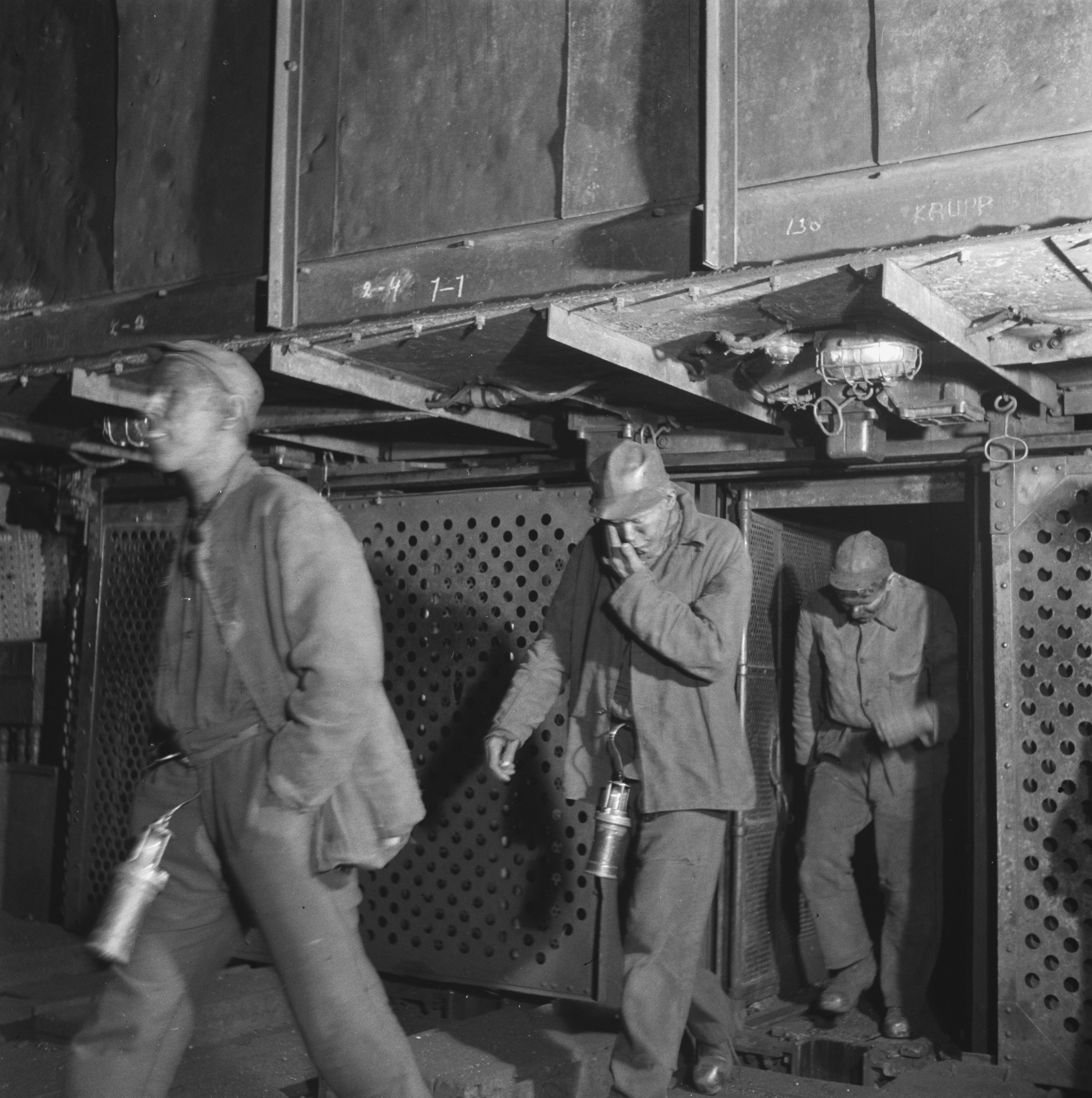 Collectie / Archief : Fotocollectie Anefo Reportage / Serie : Kolenmijnen Limburg Beschrijving : Kolenmijnen Limburg Datum : 21 november 1945 Locatie : Limburg Trefwoorden : mijnbouw, mijnen, mijnwerkers Fotograaf : Taconis, Kryn / Anefo Auteursrechthebbende : Nationaal Archief Materiaalsoort : Negatief (zwart/wit) Nummer archiefinventaris : bekijk toegang 2.24.01.03 Bestanddeelnummer : 901-1057